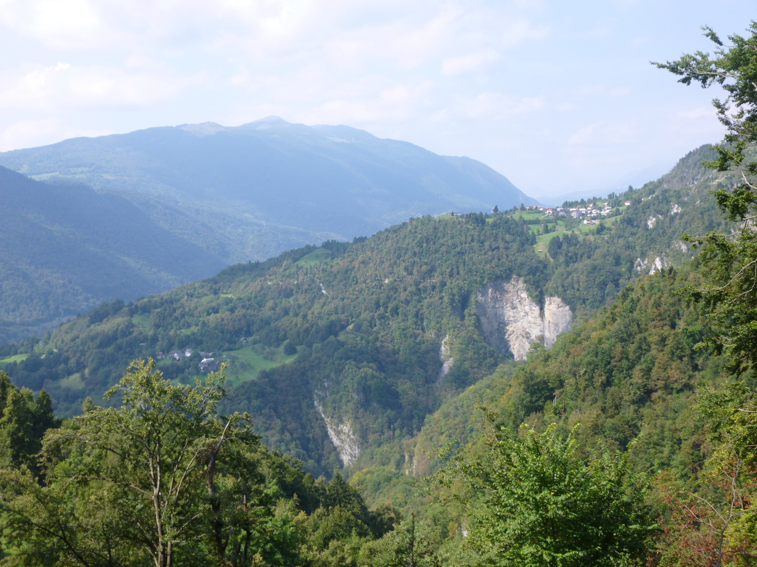 14 Blick auf Vrsno